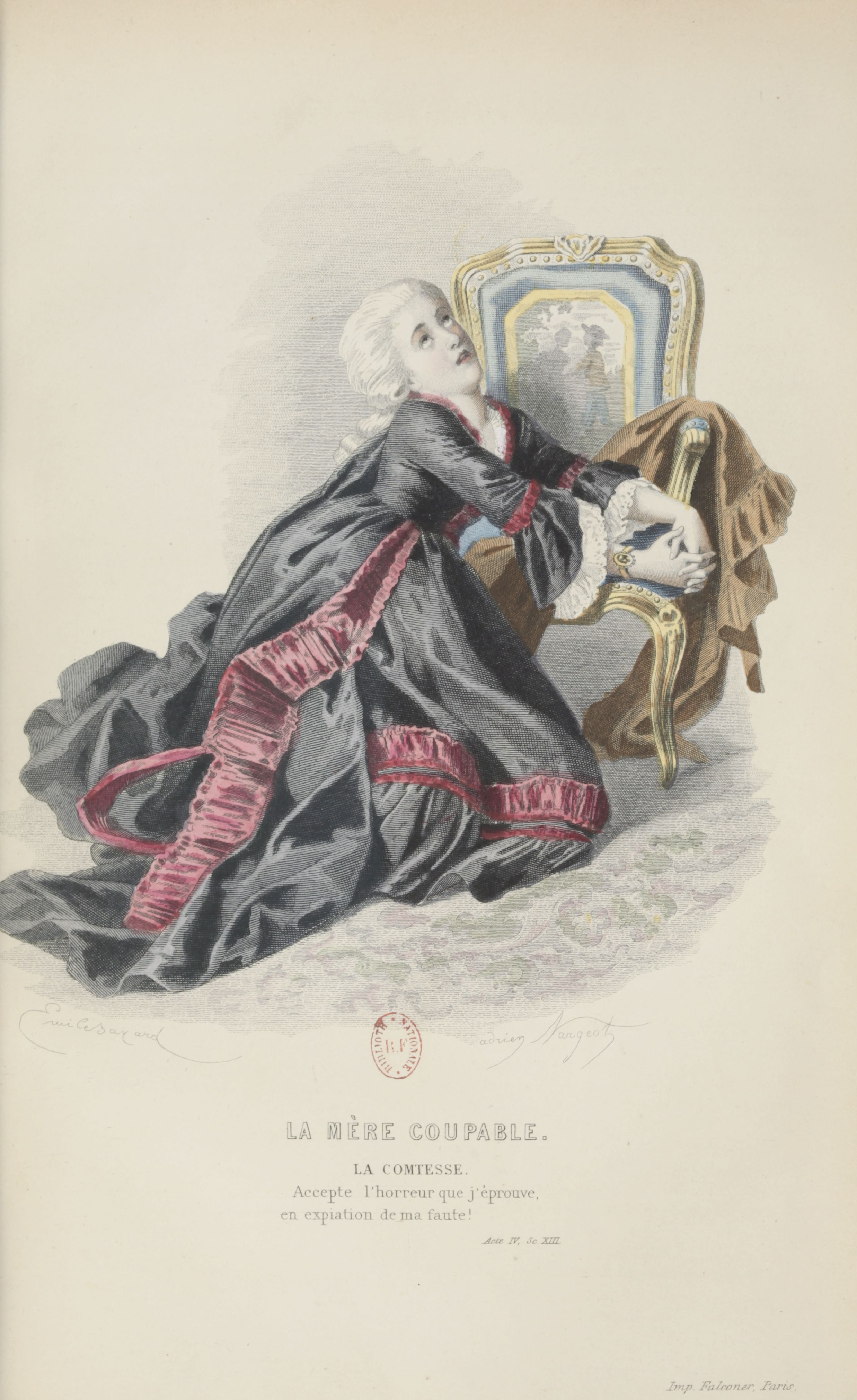 Adrien Nargeot (* 1837): Gräfin Almaviva. Illustration zu Pierre-Augustin Caron de Beaumarchais (1732–1799): La mère coupable (1792). Aus: Oeuvres complètes de Beaumarchais, hrsg. v. Édouard Fournier, Paris 1876, S. 190/191. Bibliothèque nationale de France.